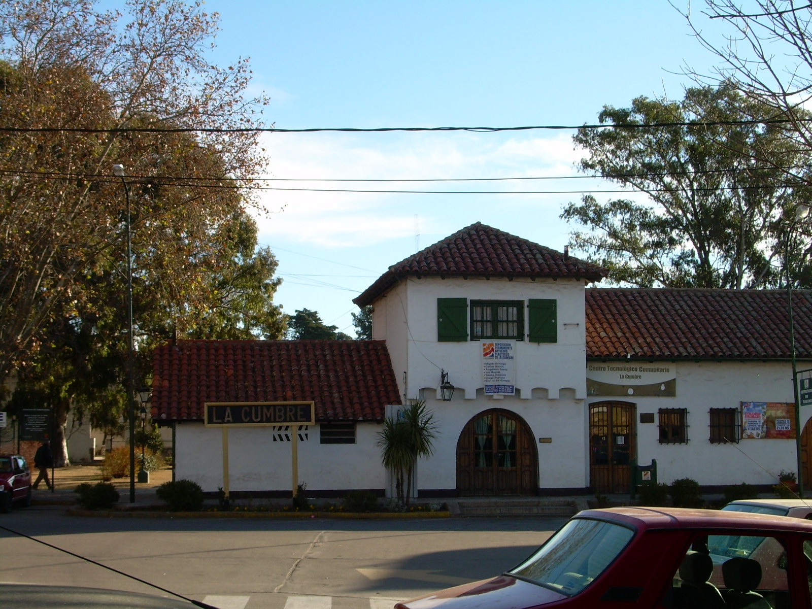 Centro Tecnológico Comunitario (CTC), La Cumbre.